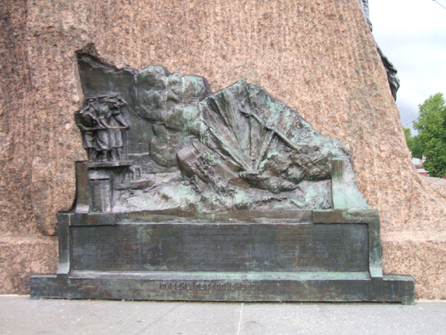 Барельеф гибель "Петропавловска" (памятник Макарову в Кронштадте)